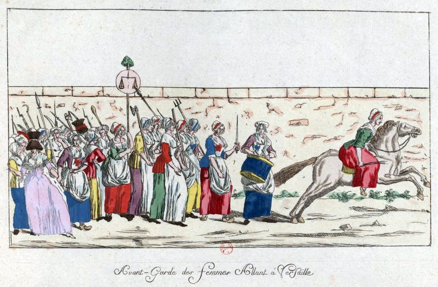 Avant-garde des femmes allant à Versaille